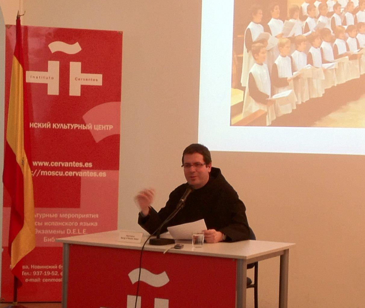 Подпись к фото: Брат Сержи д'Ассиз Жельпи, хормейстер Эсколании, читает лекцию в Институте Сервантеса.